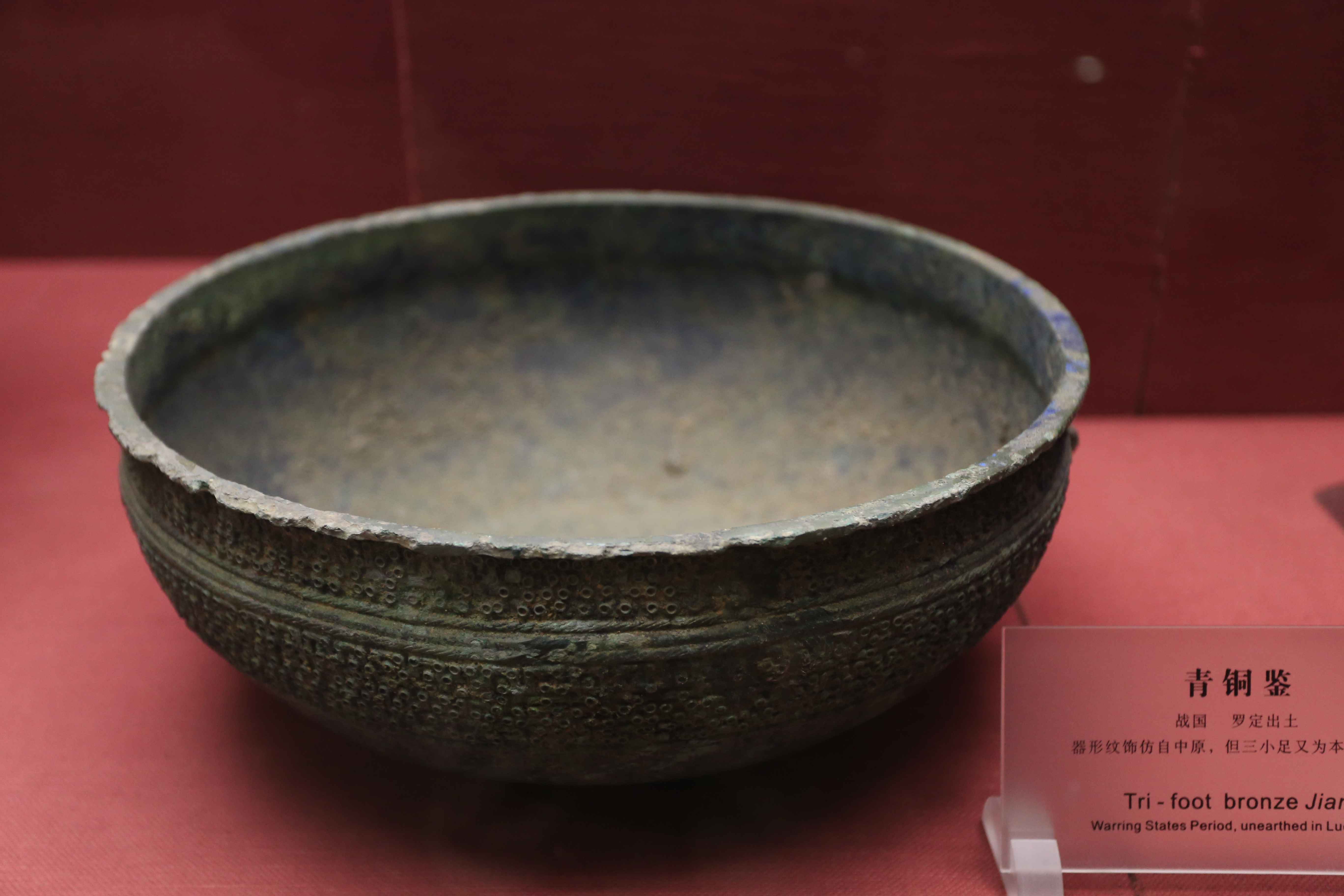 广东省博物馆藏品——青铜鉴，战国，罗定出土